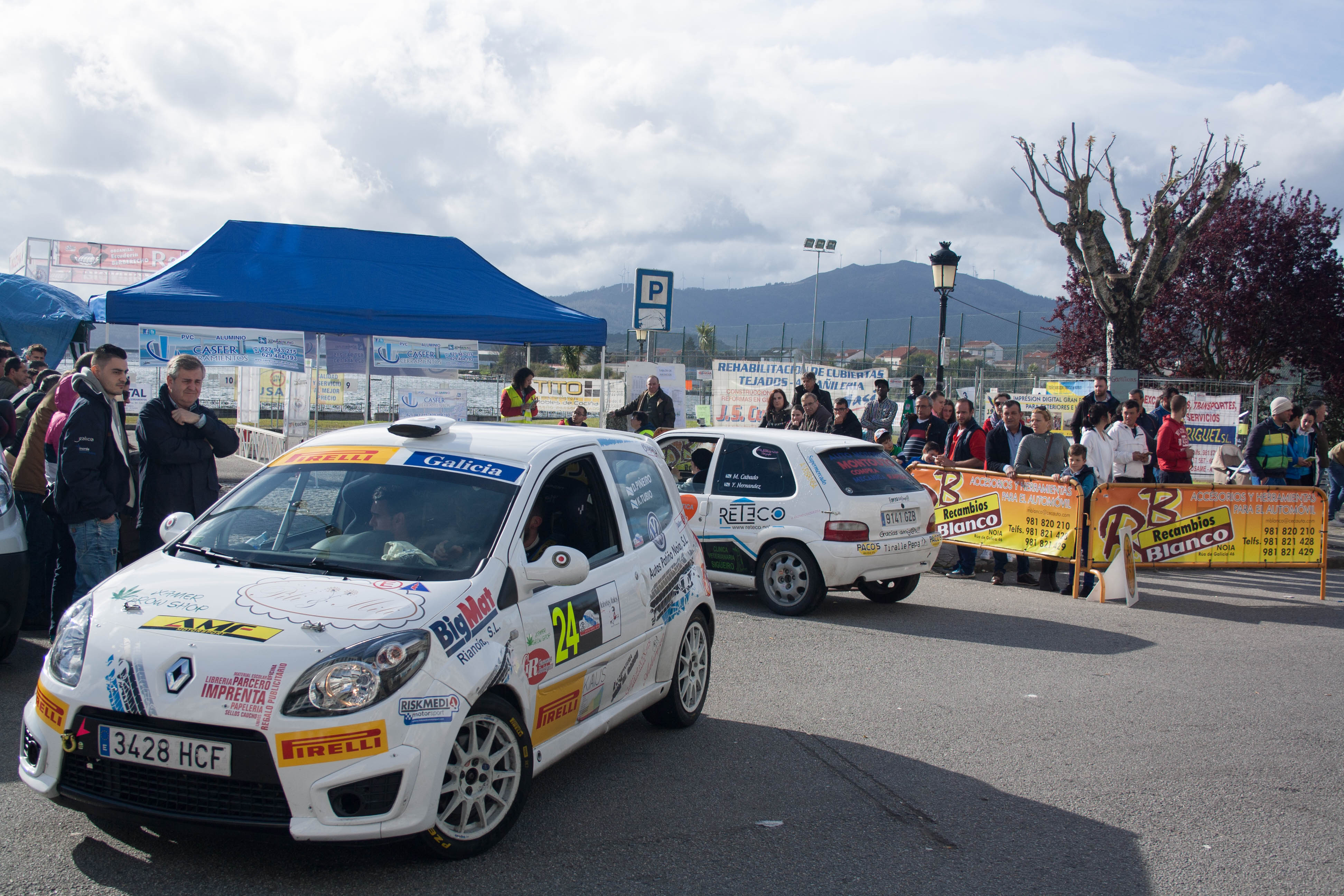 Parking Cerrado